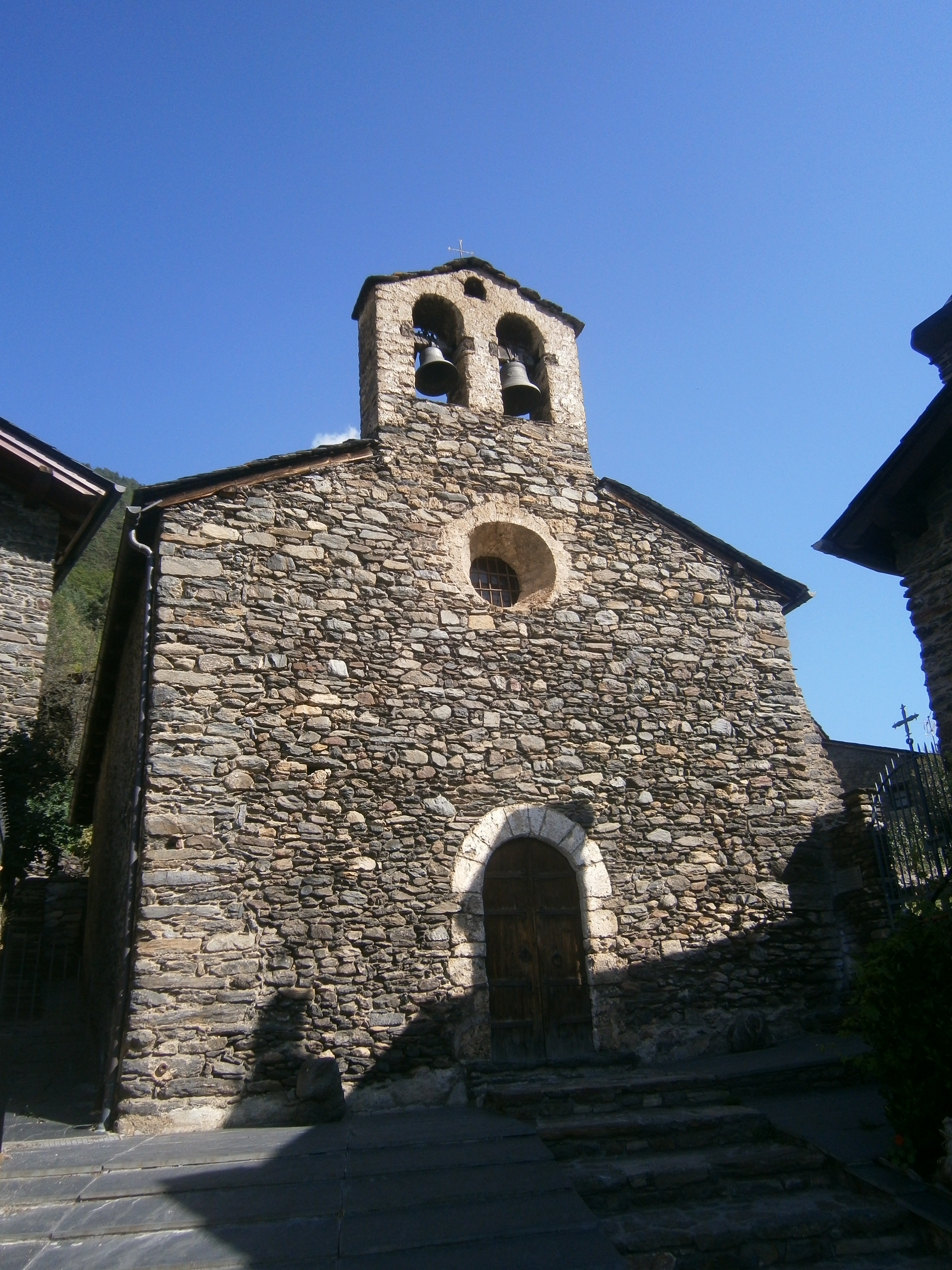 Església de Sant Serni de Llorts (Ordino)